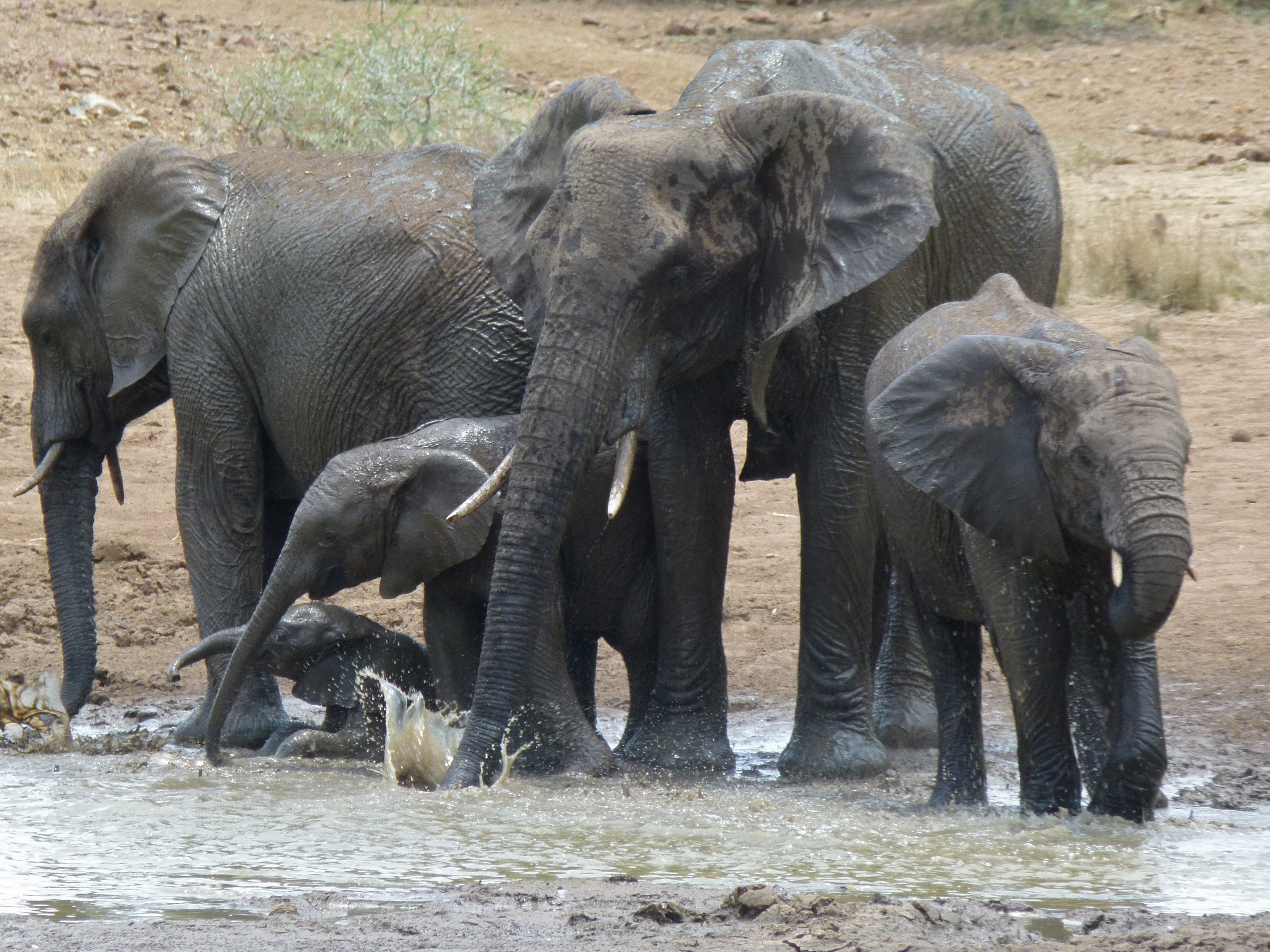 Ratlogo Hide, Pilanesberg NP, SOUTH AFRICA